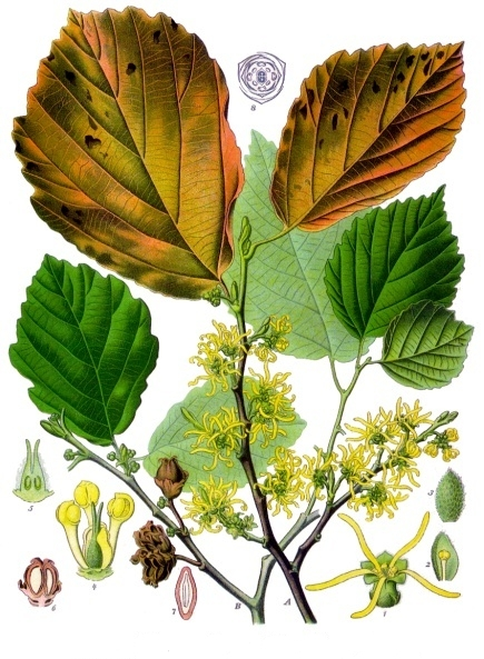 Zaubernuss. A ein blühender Zweig mit Herbstbelaubung, natürl. Grösse. B ein fruchttragender Zweig mit Sommerbelaubung, natürl. Grösse. 1 Blüte vergrössert 3/1; 2 Kelchblatt mit Staubblatt vergrössert 3/1; 3 Kelchblatt, Rückseite; 4 Geschlechtsorgane im Längsschnitt, stark vergrössert; 5 Pistill im Längsschnitt, stark vergrössert; 6 Frucht im Längsschnitt, natürl. Grösse; 7 Samen im Längsschnitt, vergrössert; 8 Diagramm.